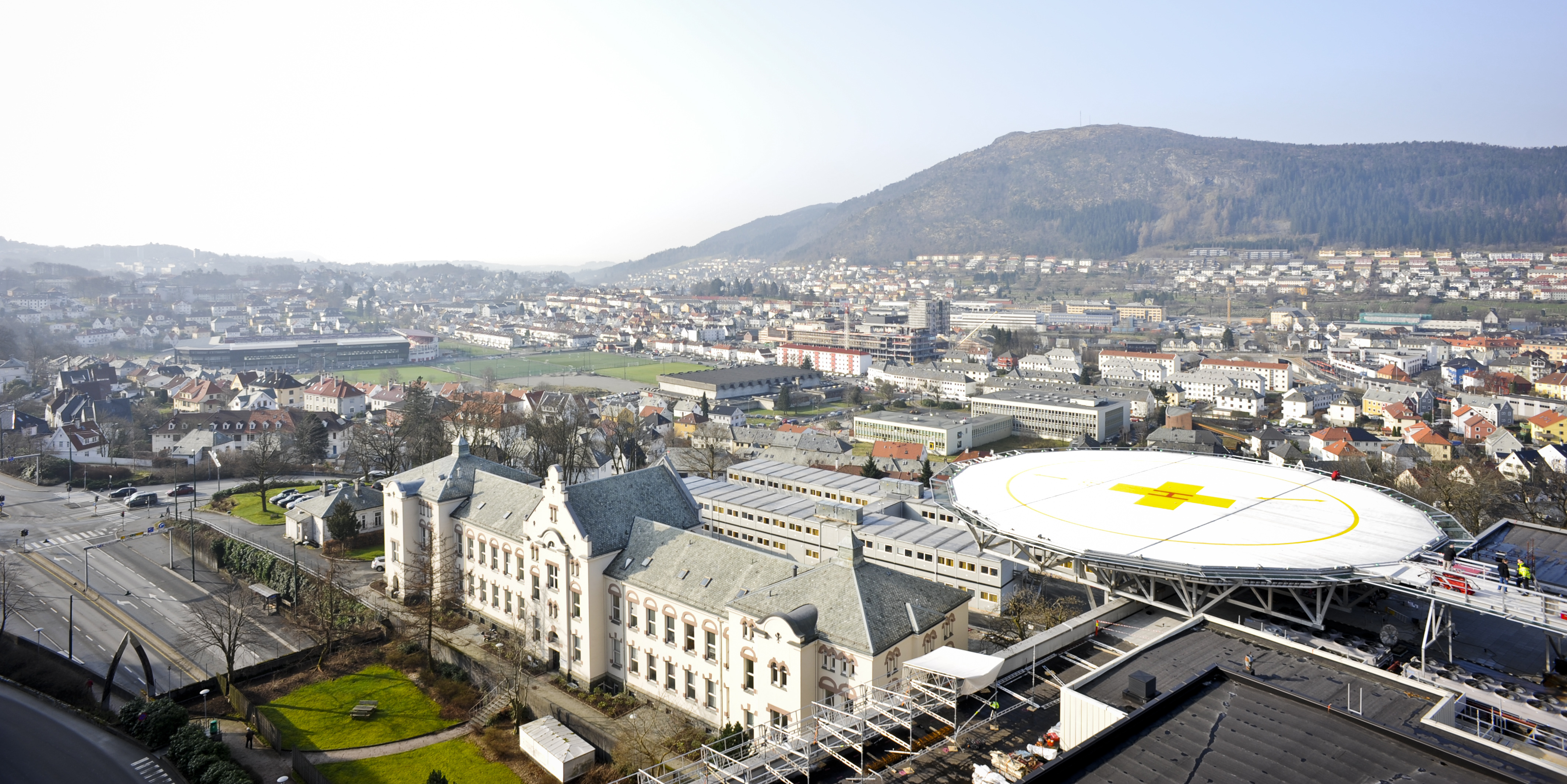 Brann stadion i bakgrunnen. Helipad at Haukeland University Hospital